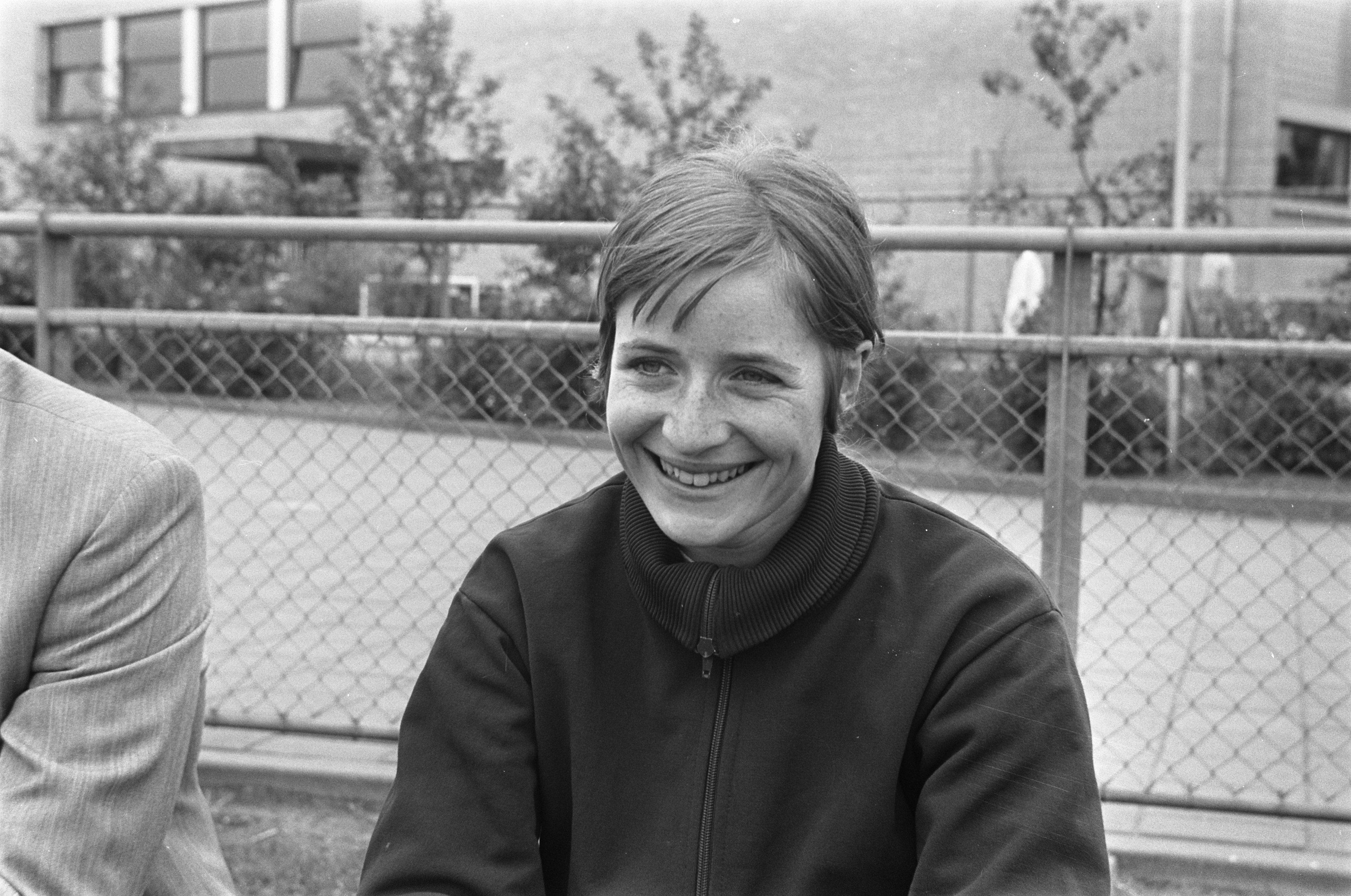 Collectie / Archief : Fotocollectie Anefo Reportage / Serie : [ onbekend ] Beschrijving : Internationale atletiekwedstrijden in Ookmeer, Amsterdam. Wilma van den Berg (sprintster) Datum : 25 mei 1969 Locatie : Amsterdam, Noord-Holland Trefwoorden : atletiek, wedstrijden Persoonsnaam : Berg, Wilma van den Fotograaf : Evers, Joost / Anefo Auteursrechthebbende : Nationaal Archief Materiaalsoort : Negatief (zwart/wit) Nummer archiefinventaris : bekijk toegang 2.24.01.05 Bestanddeelnummer : 922-4581